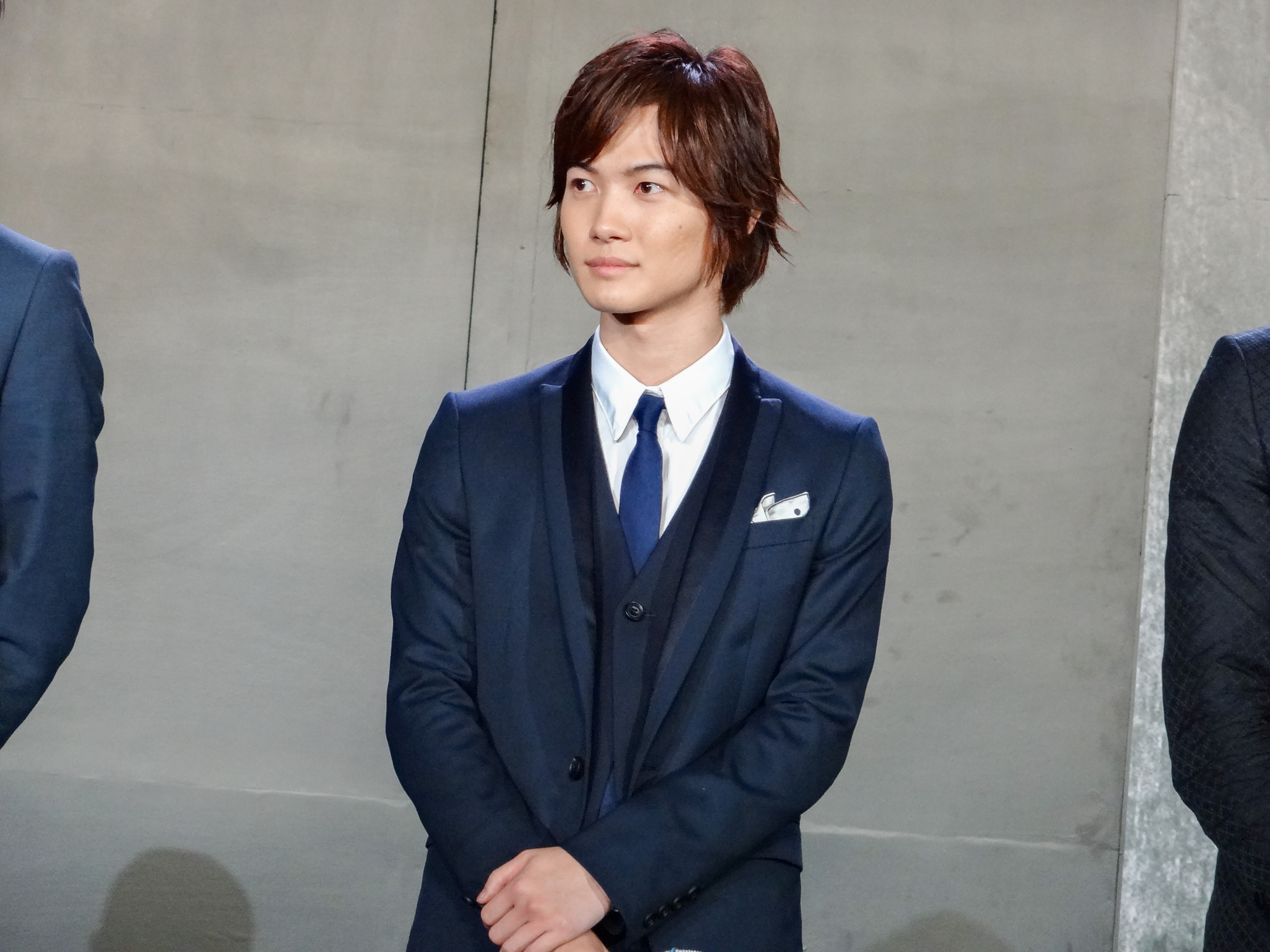 るろうに剣心 京都大火編/伝説の最期編 レッドカーペット 神木隆之介